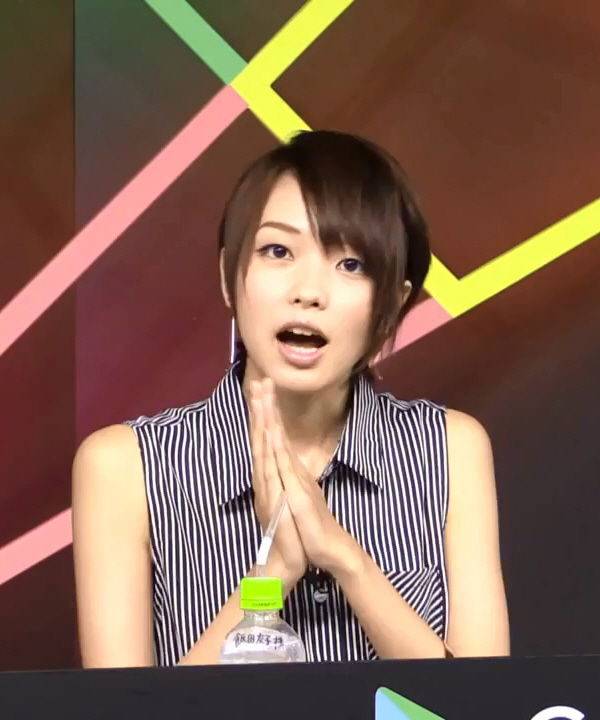 【GAMEFEST 2016夏＃45】声優三人でデレステチャレンジ！